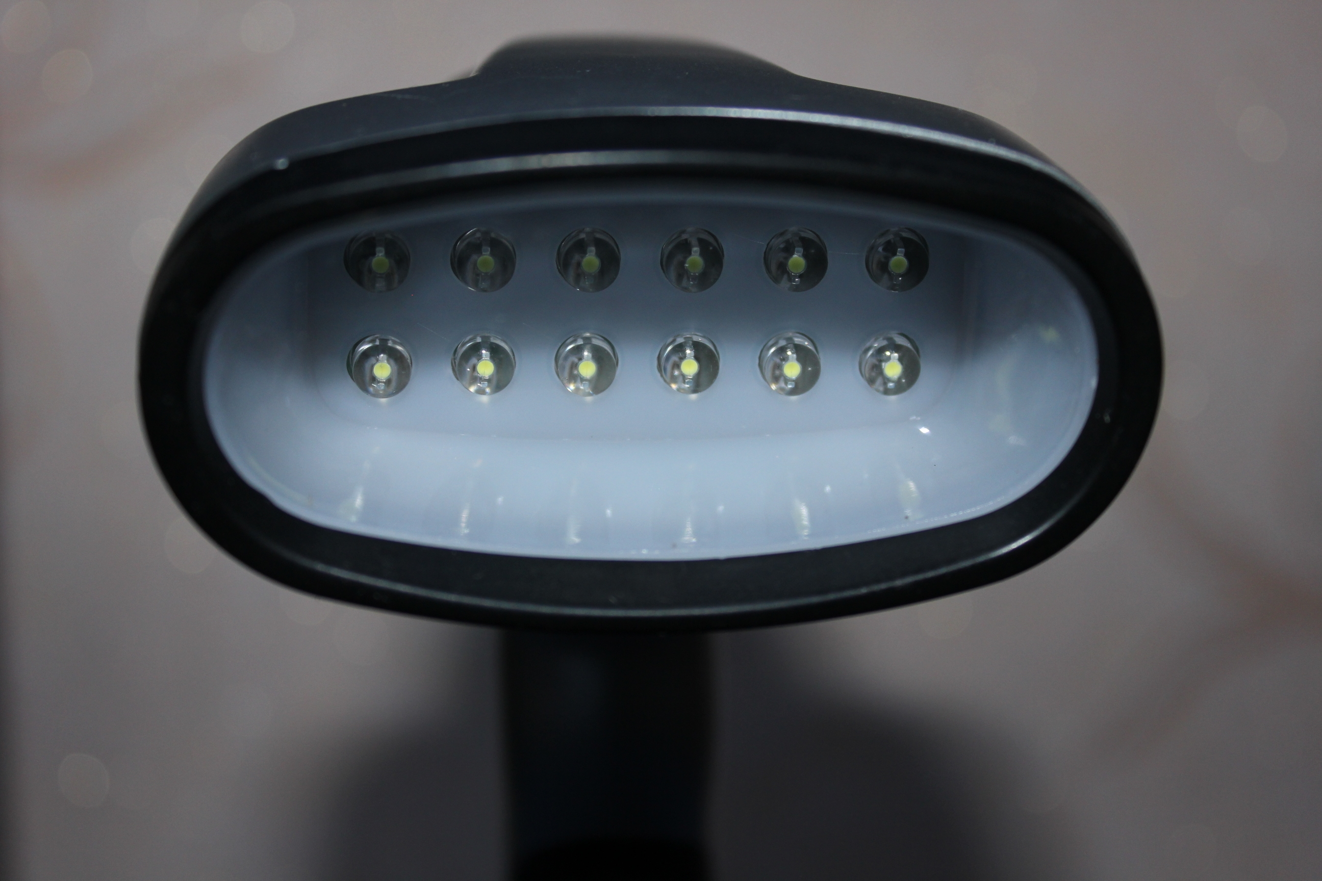 Светодиодная часть светильника